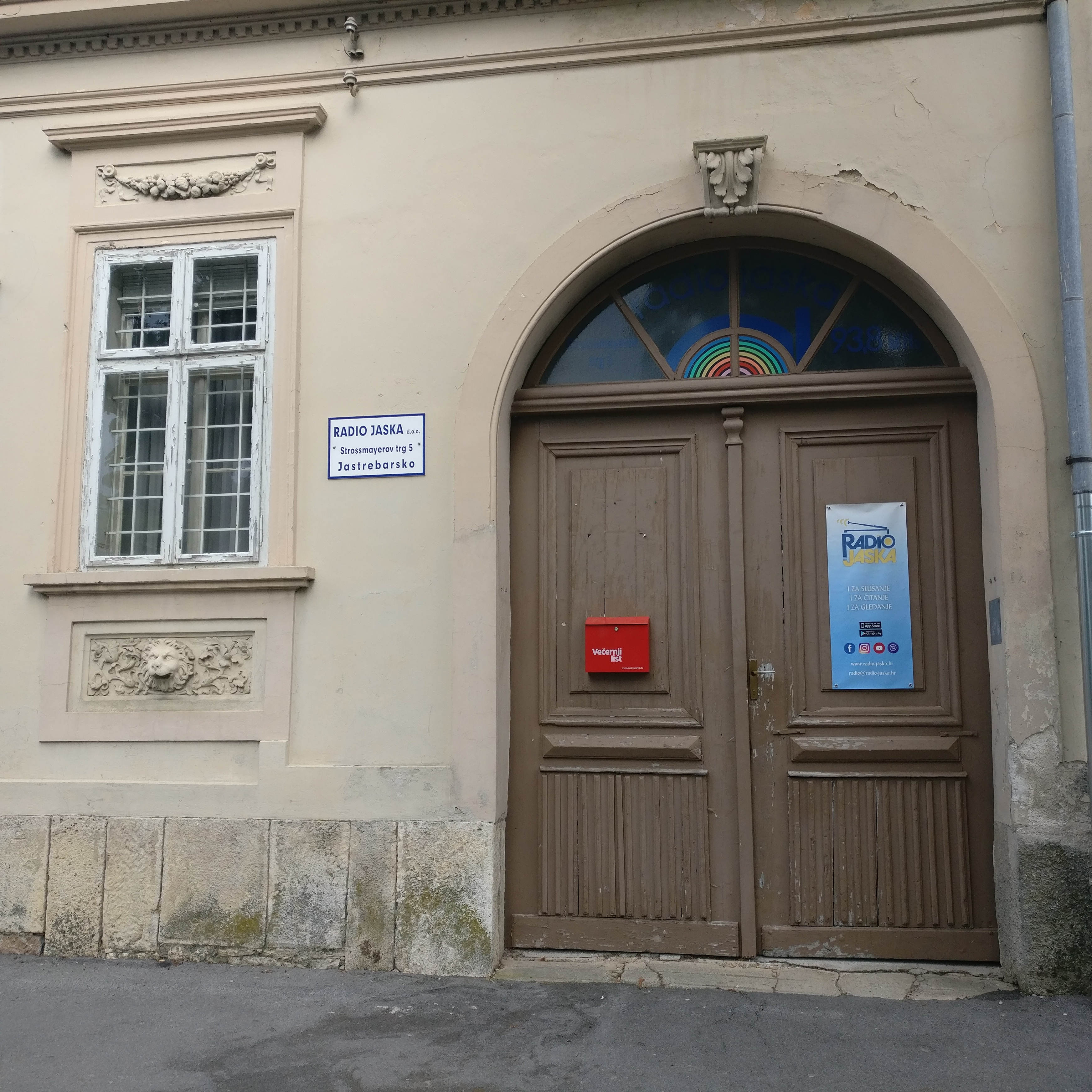 Ulaz u Radio Jasku